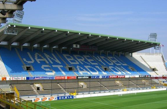 Jan Breydel Stadium (Bruges)